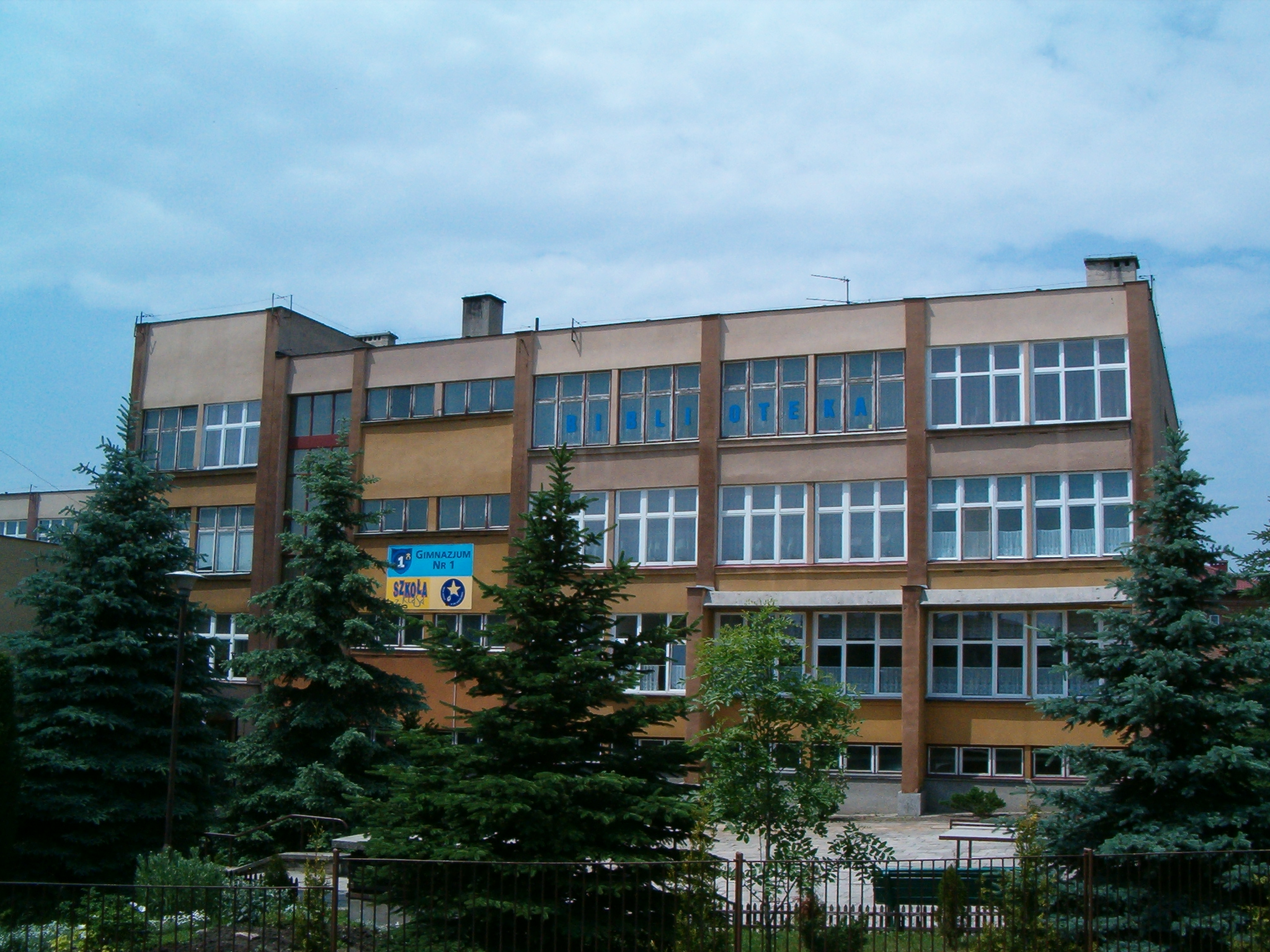 Gimnazjum numer 1 w Pińczowie